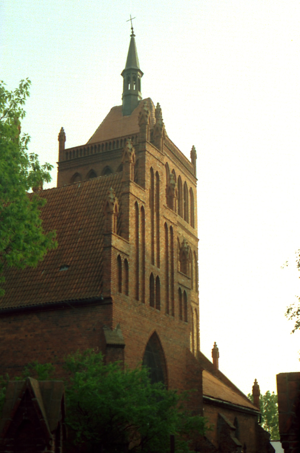 Chełmża, kościół św. Mikołaja